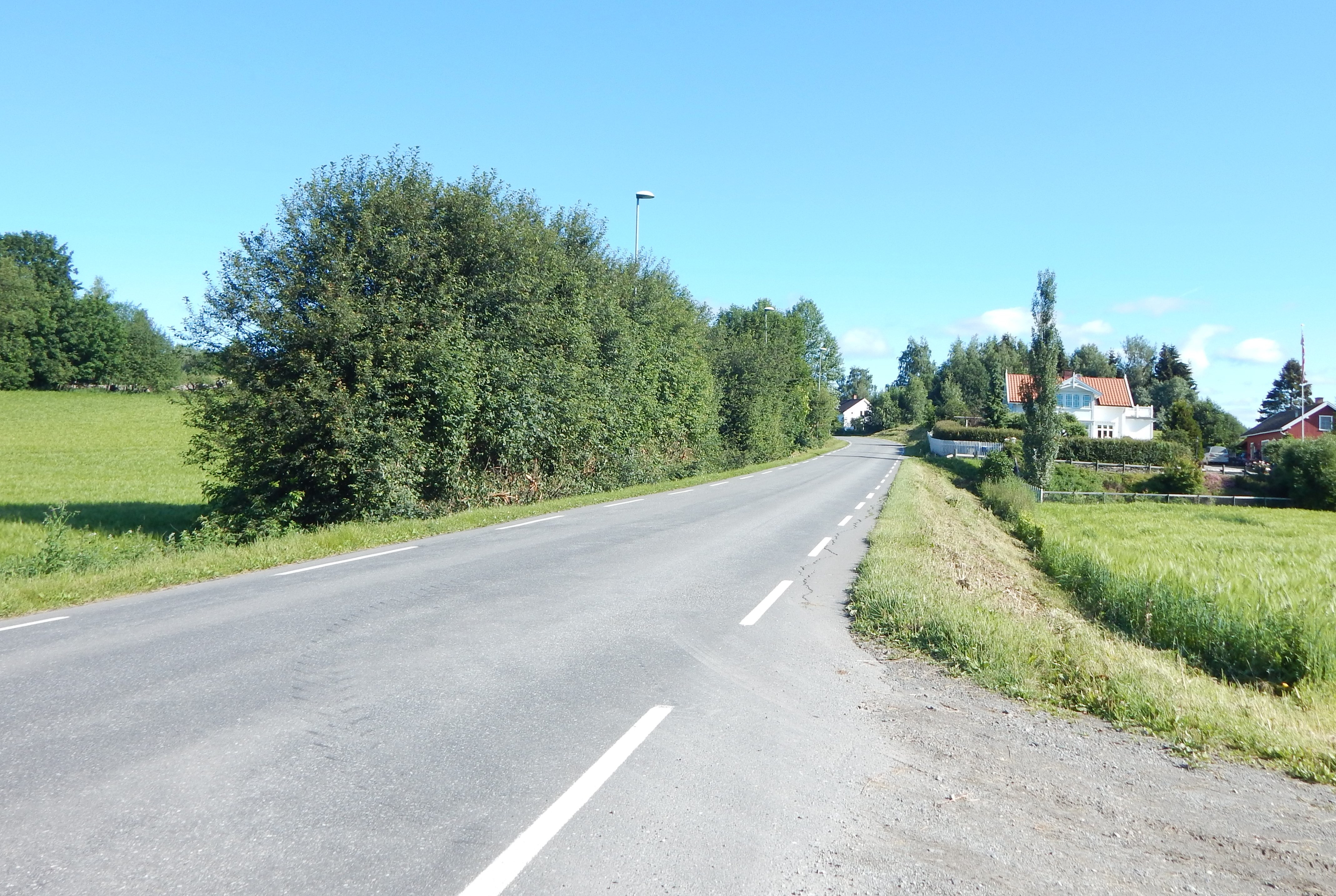 Kappvegen (FV1800, tidl. FV105) nord for riksvei 25